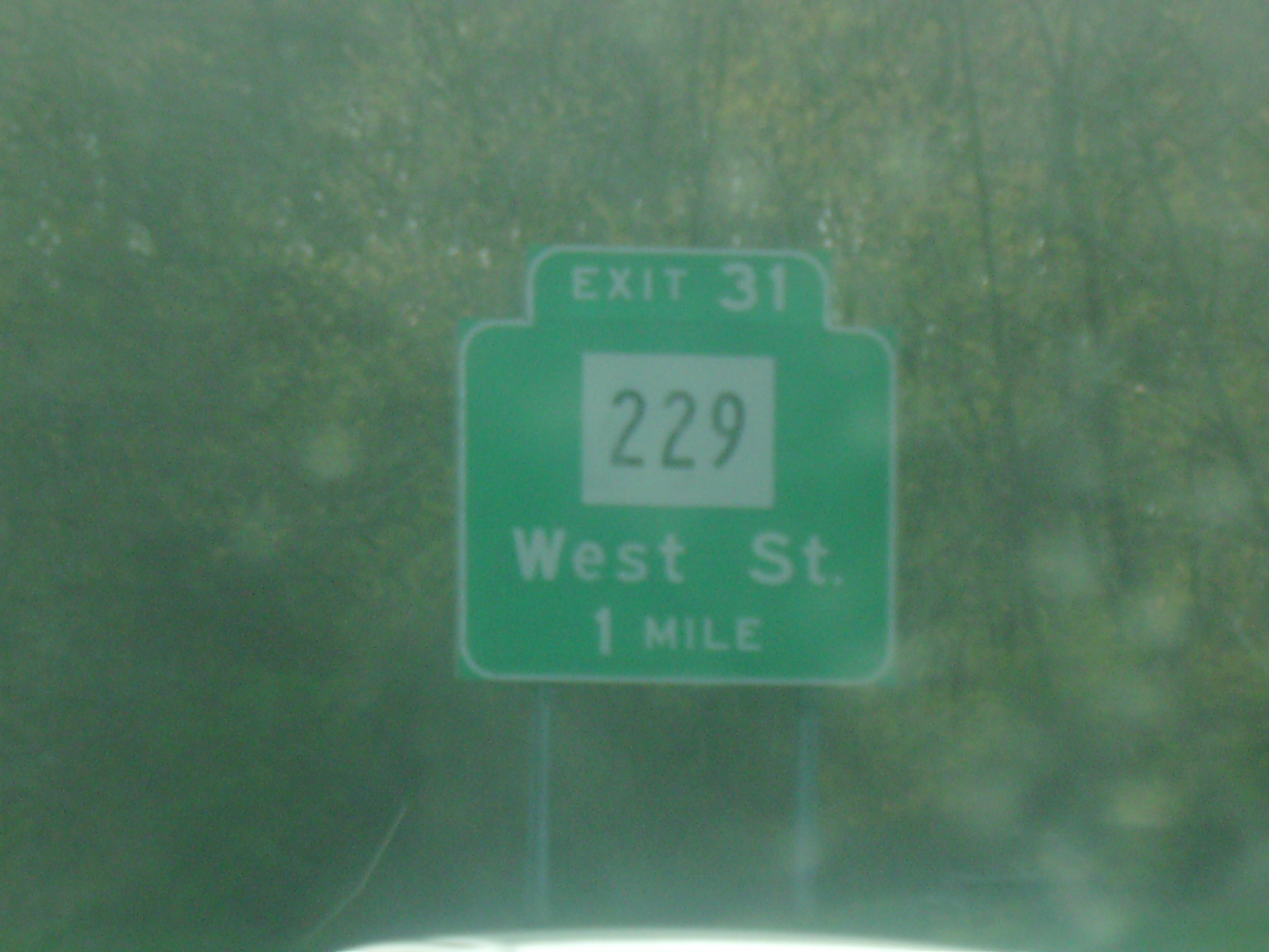 Big Green Sign depicting Exit 31 on Interstate 84 in CT.